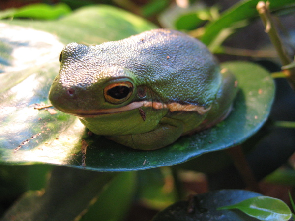 Hyla cinera Erlaubnis: E-mail an Erik Möller, 4. Oktober 2005